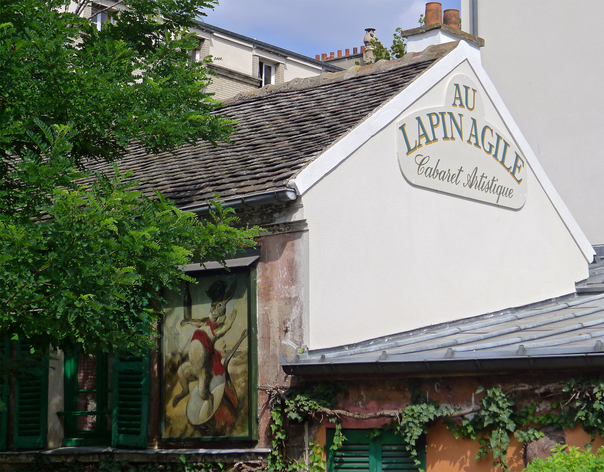 Au Lapin Agile (décoration) - Paris XVIII